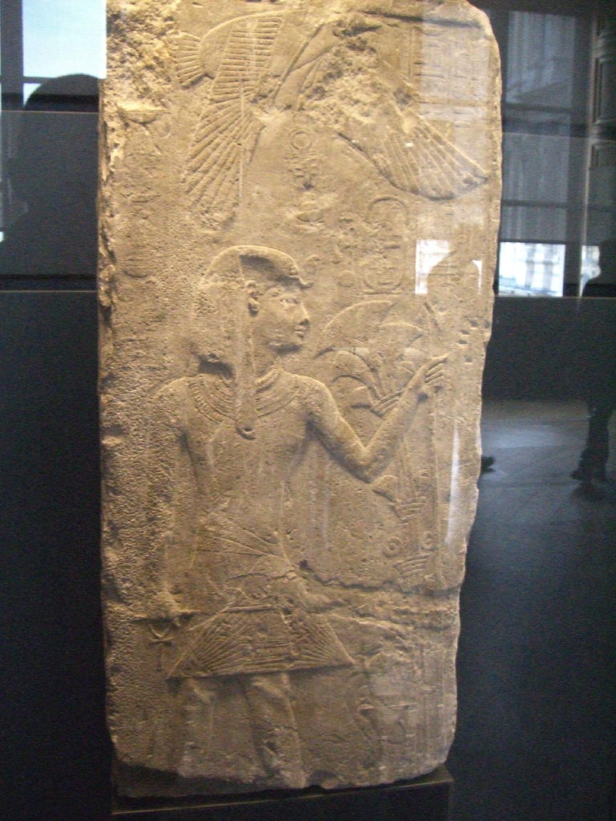 Stèle représentant le roi Menkaouhor de Ve dynastie égyptienne - Saqqarah - XVIIIe dynastie égyptienne. Louvre.fr